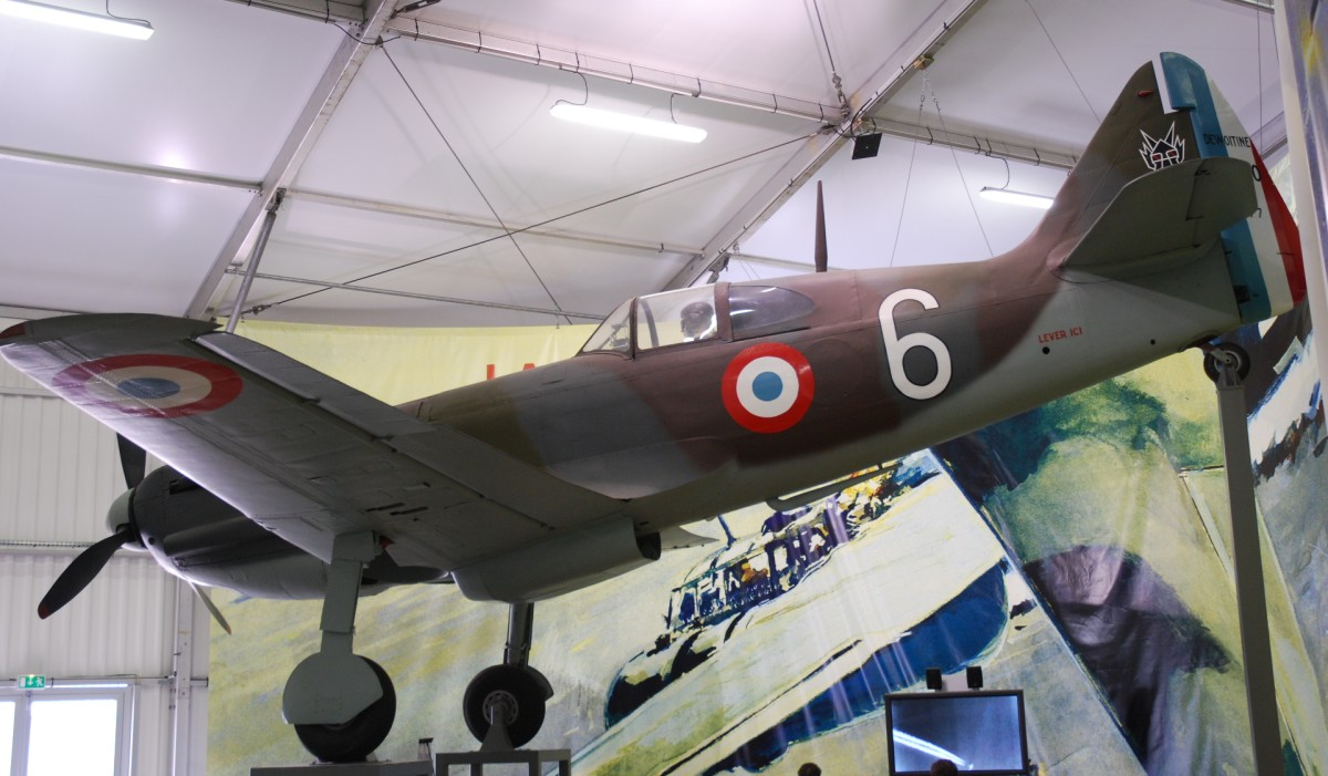 Dewoitine D.520 preserved at Musée de l'Air et de l'Espace